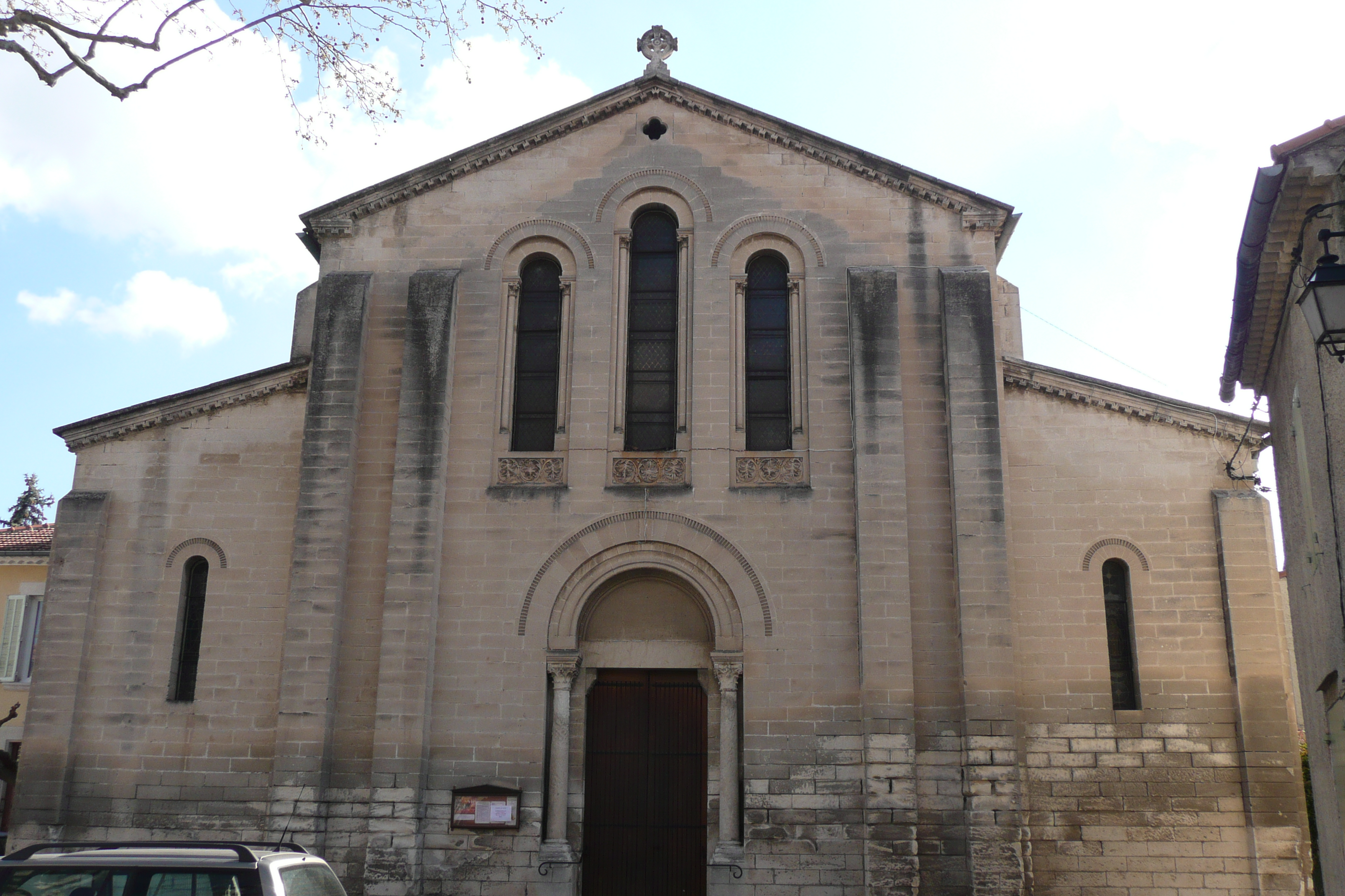 Eglise à Cabannes.